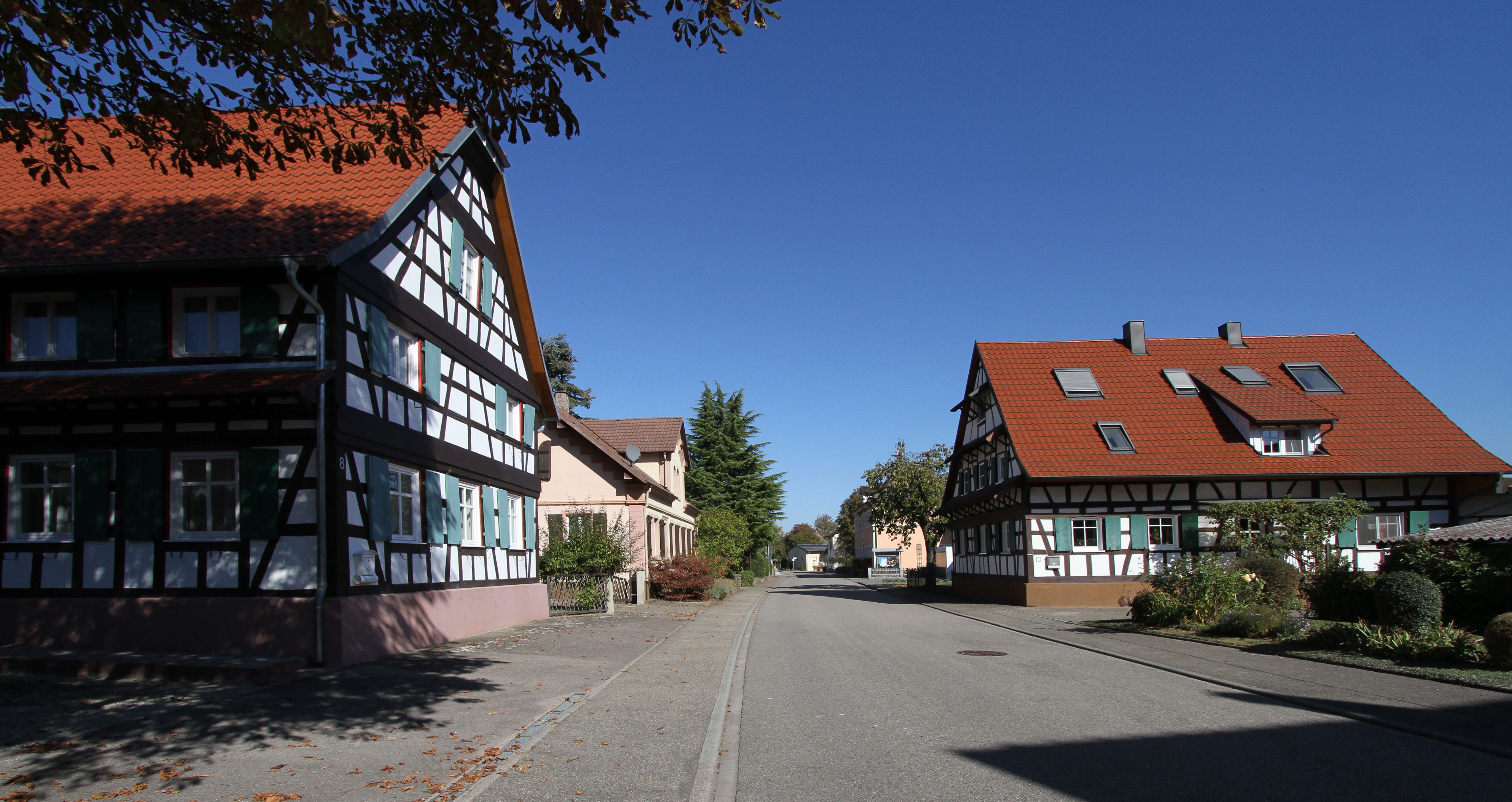 Muckenschopf